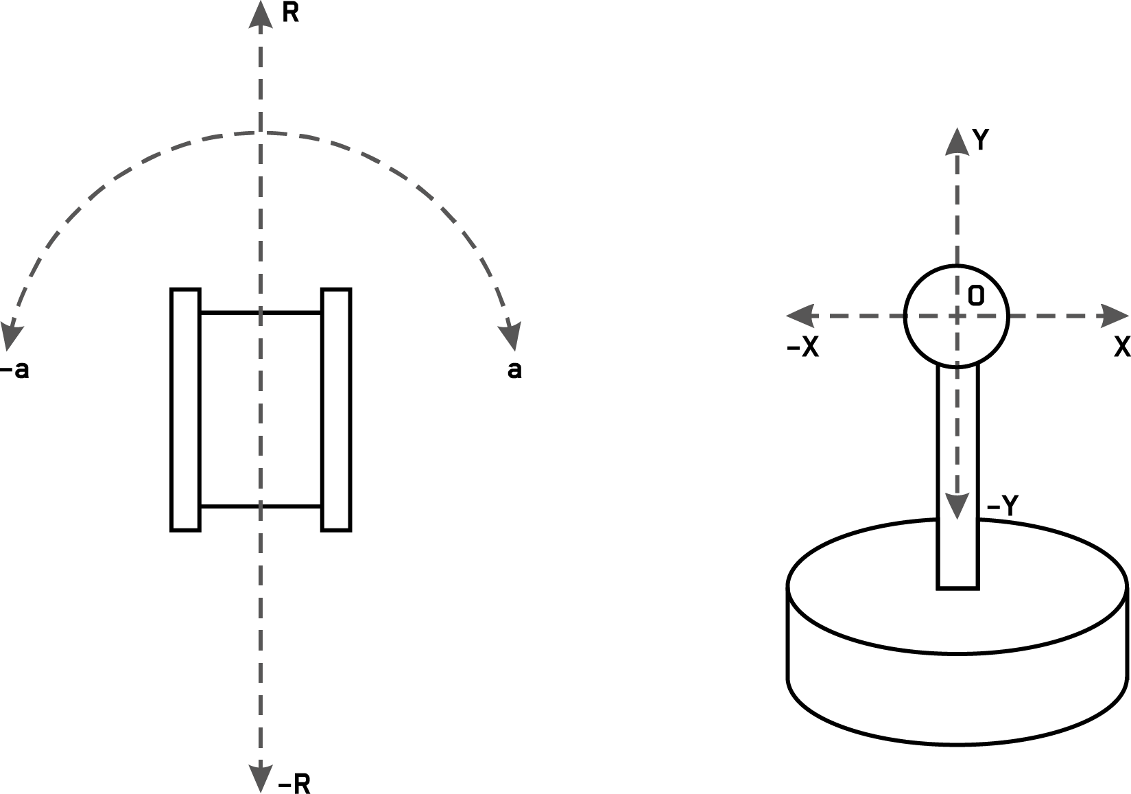 Пример осей робота и управляющего устройства